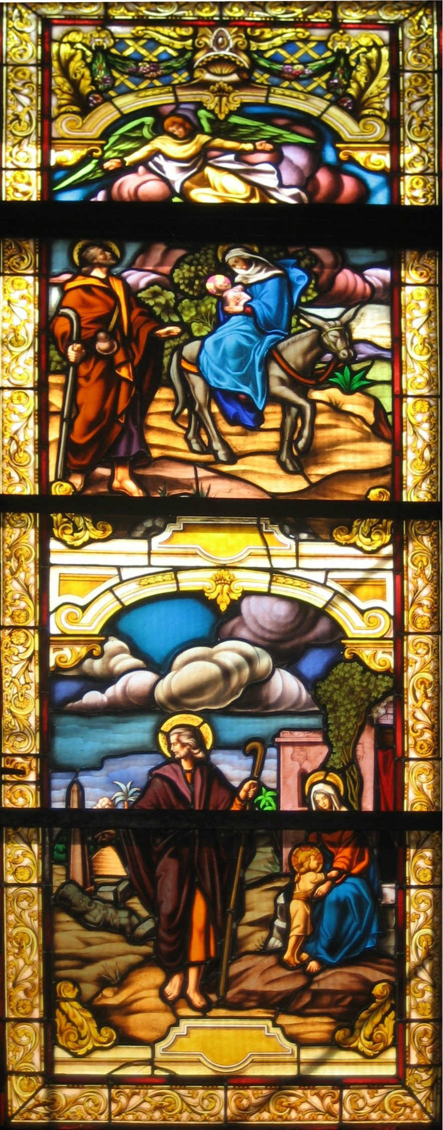 Cuba, Parroquia de San José de Jatibonico: 5-Vitral de la huída y vida en Egipto